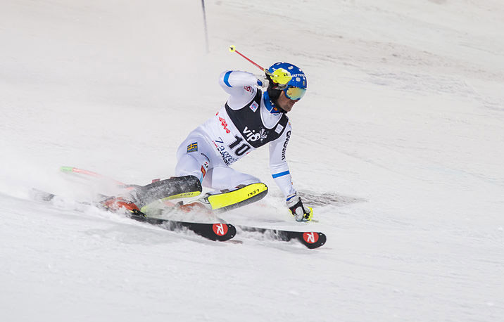 Markus Larsson, alpine skier from Sweden, at Zagreb race (06-01-2015)